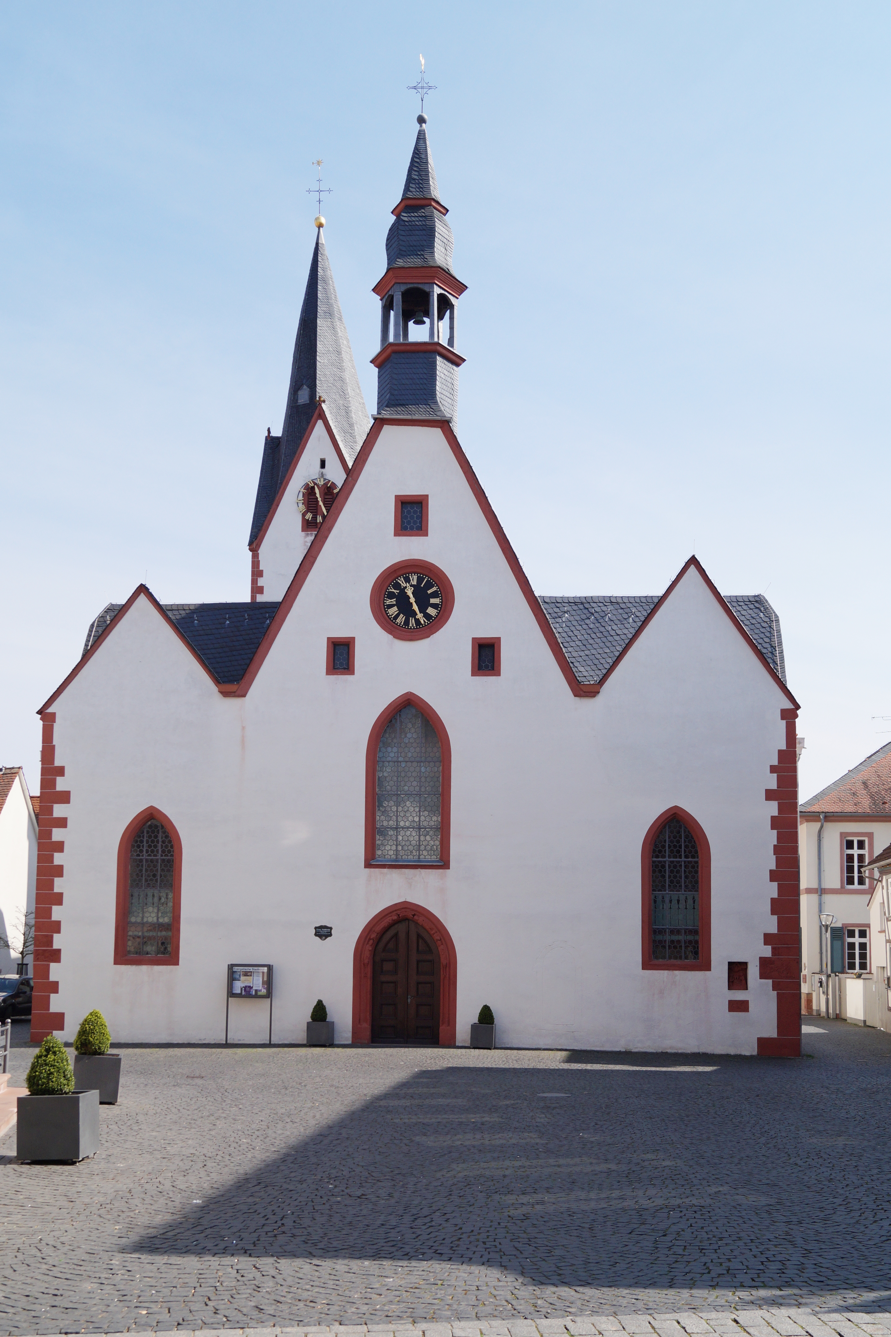 Außenansicht der Stadtkirche Babenhausen (Hessen).